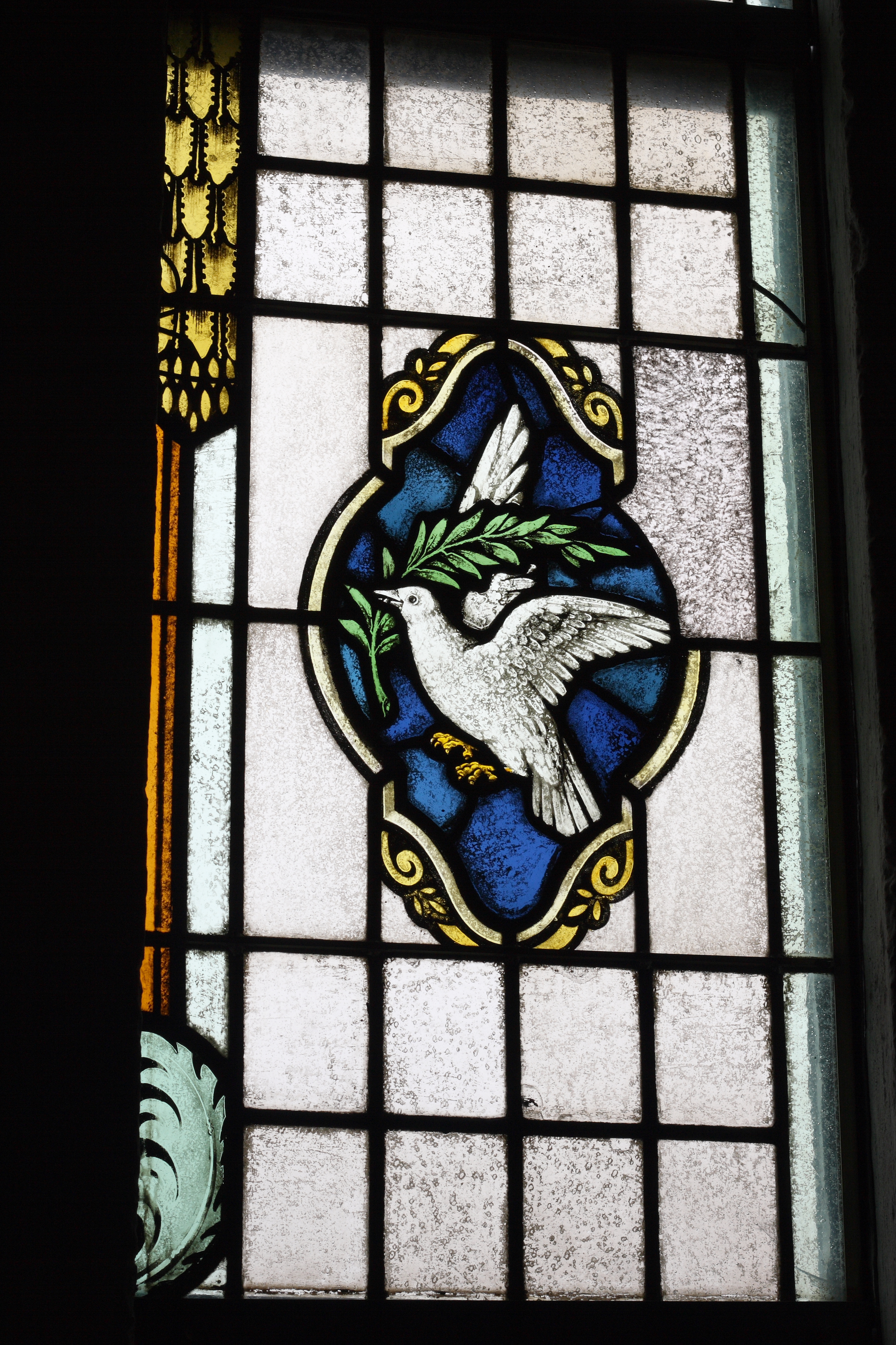 Bleiglasfenster in der katholischen Pfarrkirche St. Dionysius und Sebastian in Kruft, Darstellung (Ausschnitt): Taube